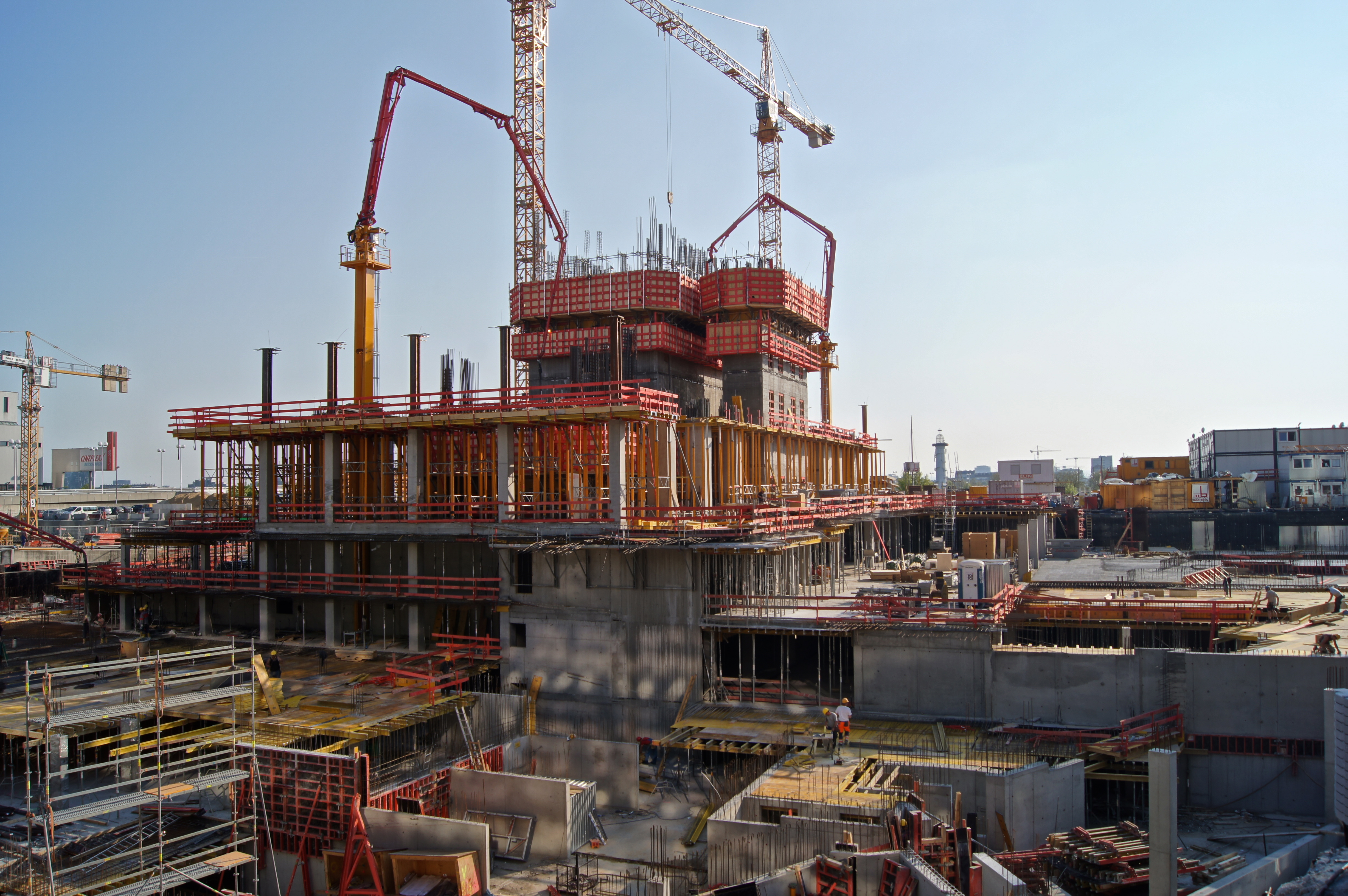 Baufortschritt des DC-Tower 1 am 19.April 2011